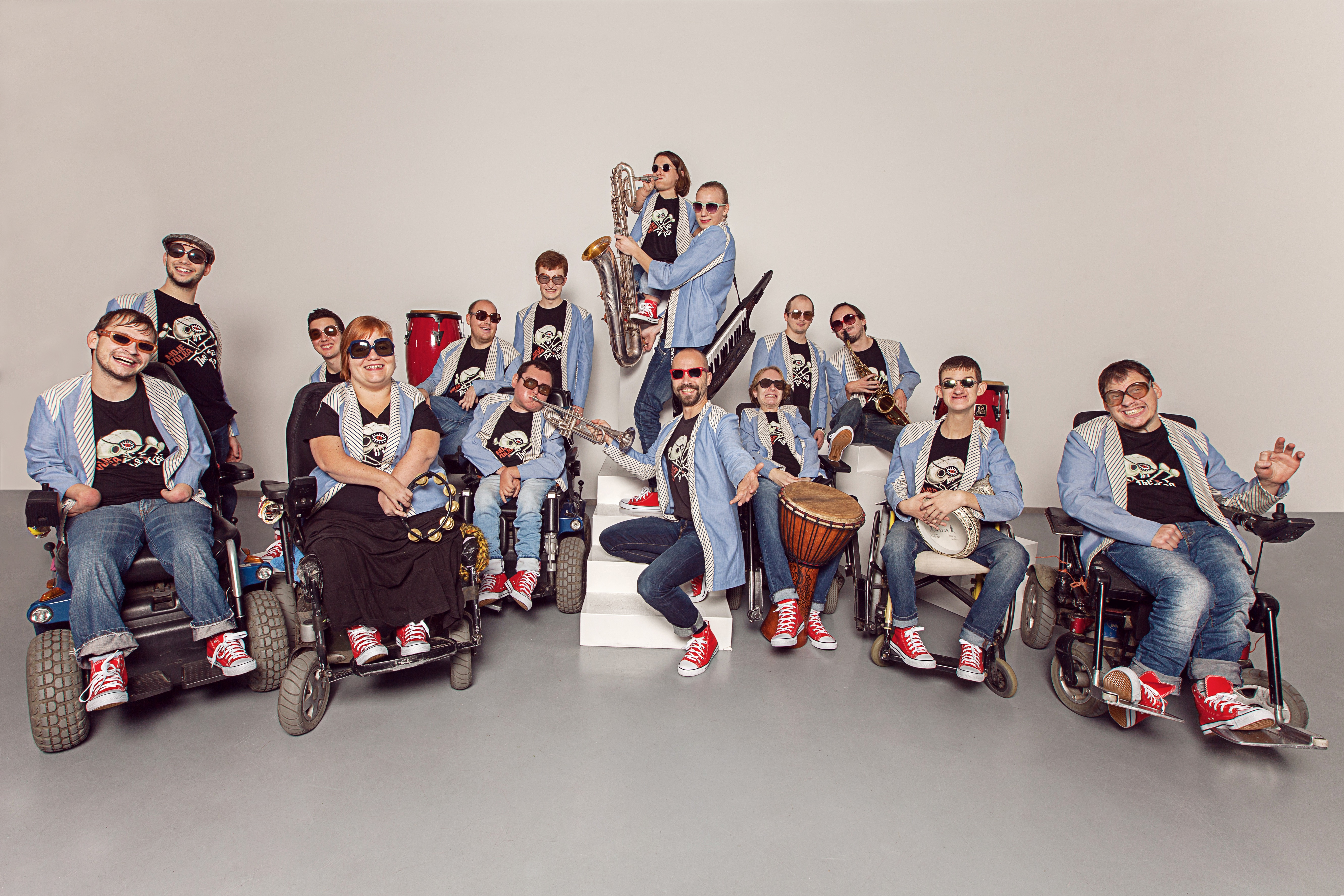 The Tap Tap, česká kapela